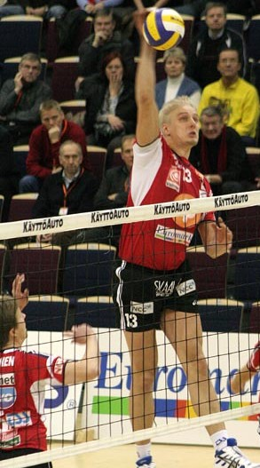 Finland volleyball player Sauli Silpo